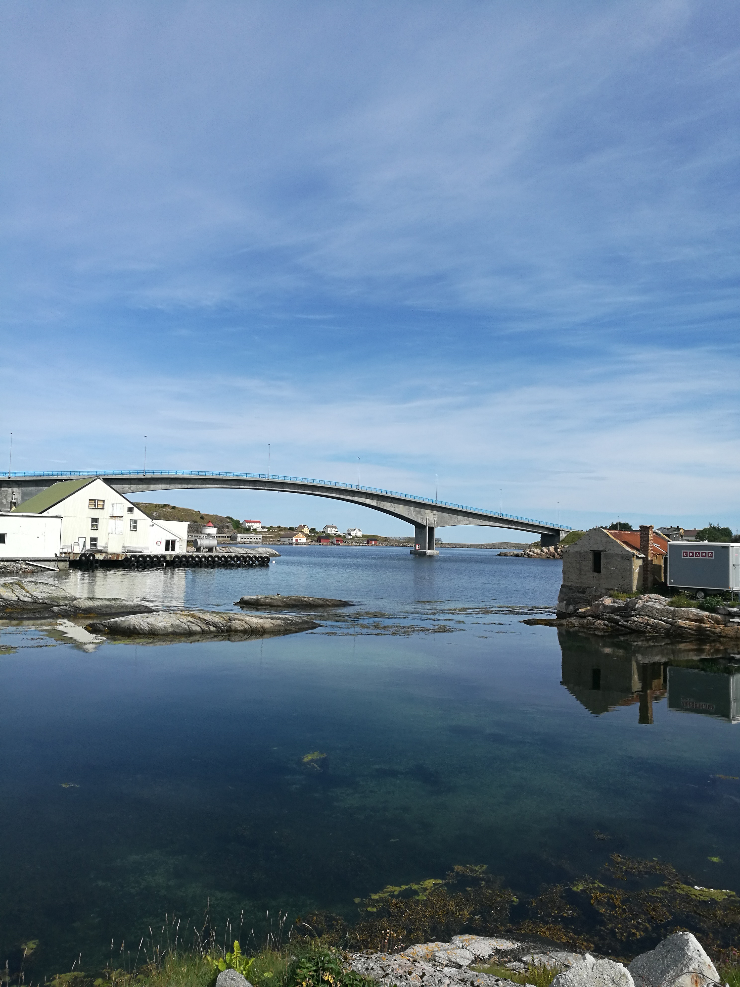 Tjønnøybrua krysser Reksundet mellom øyene Langbakken og Tjønnøy på Averøya.